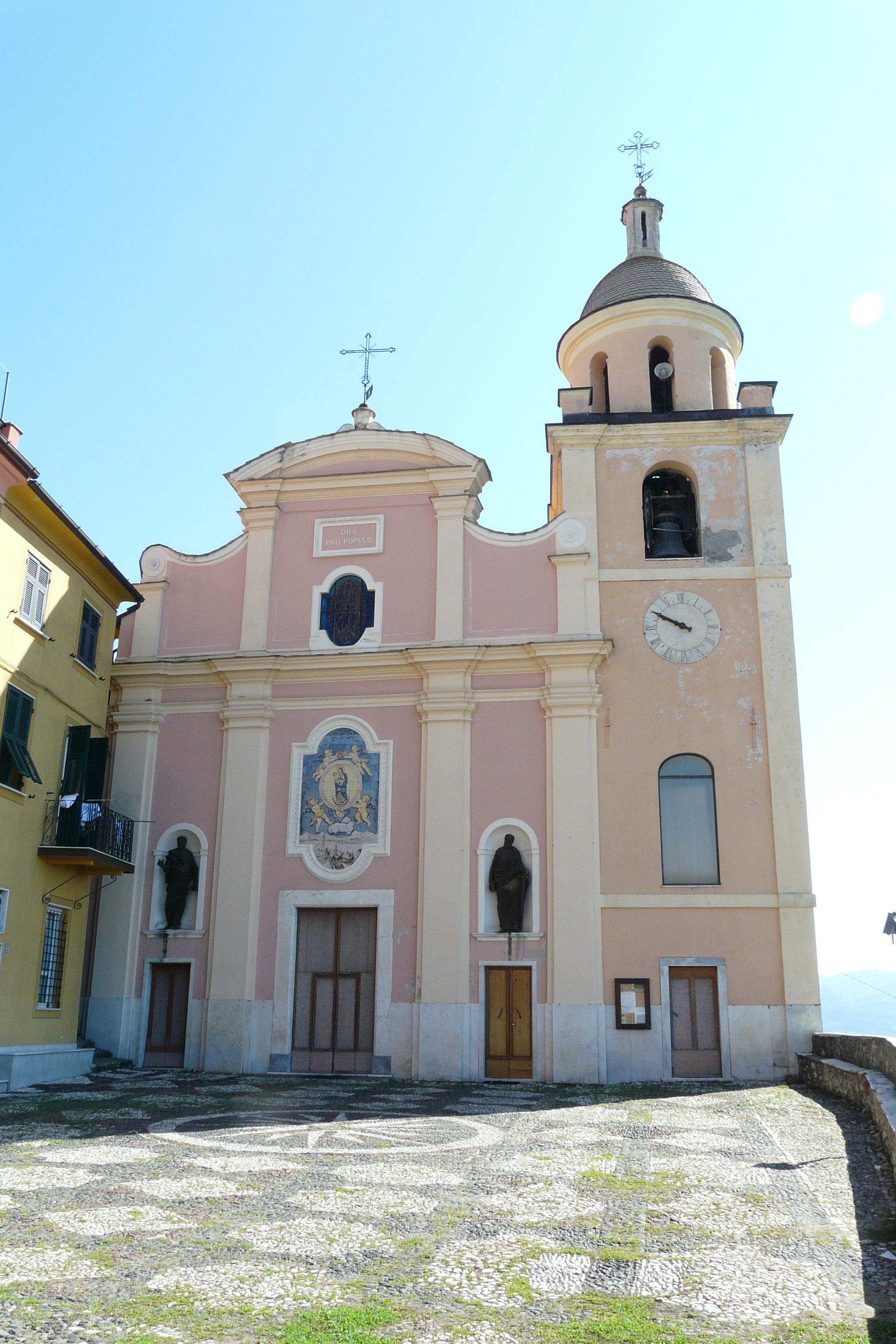 Chiesa di Nostra Signora del Soccorso, Vezzano Superiore, Liguria, Italia